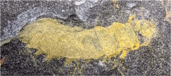 Metabolarva bella, from the Late Pennsylvanian of Germany